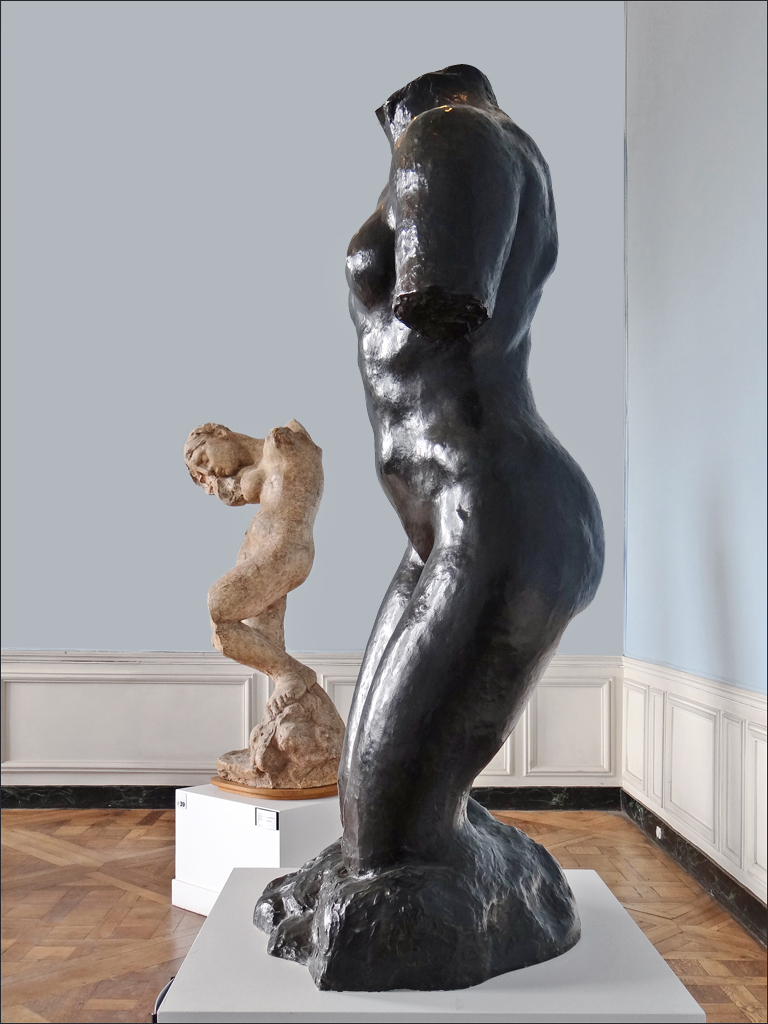 Œuvres d'Auguste Rodin (1840-1917) Au fond, "La Voix intérieure ou La Méditation sans bras" (The Inner Voice or Meditation) 1896 Plâtre Au premier plan, "La Prière" (The Prayer) 1909 Bronze, fonte Georges Rudier 1973, fonte réalisée pour les collections Site du musée Rodin